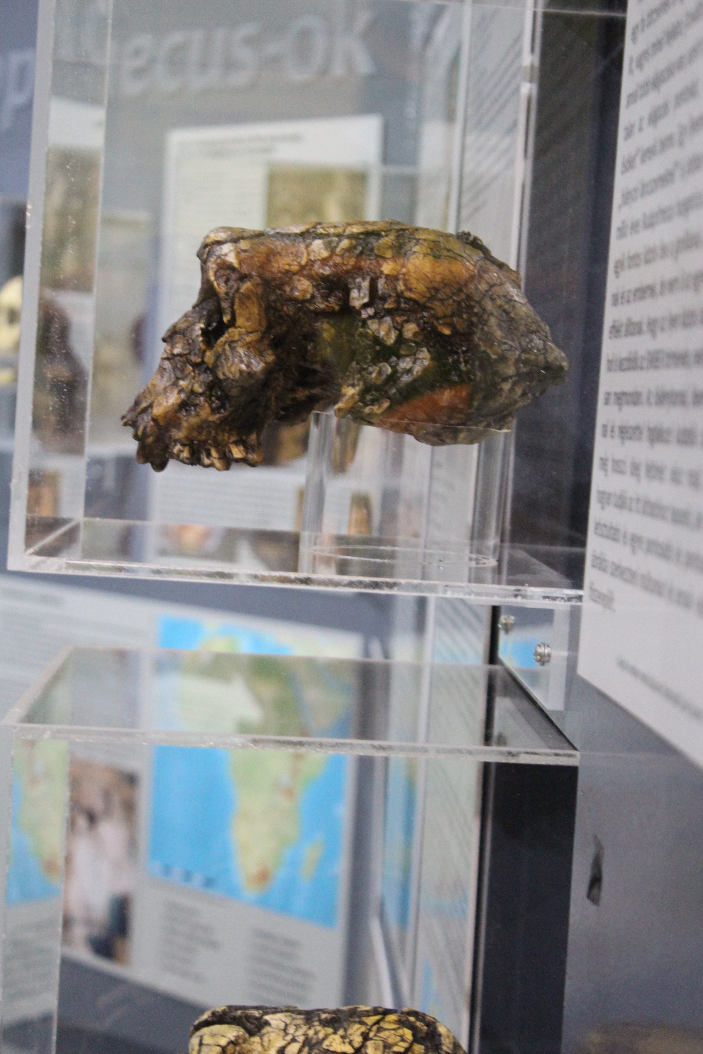 Ősember koponya, Pannon-tenger Múzeum - Miskolc, Görgey Artúr u. 28.